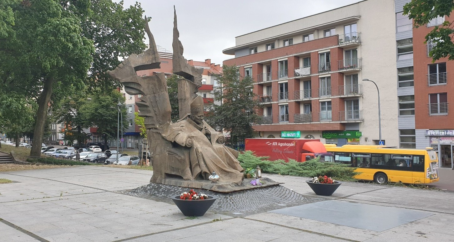 Stargard. Pomnik Jana Pawła II